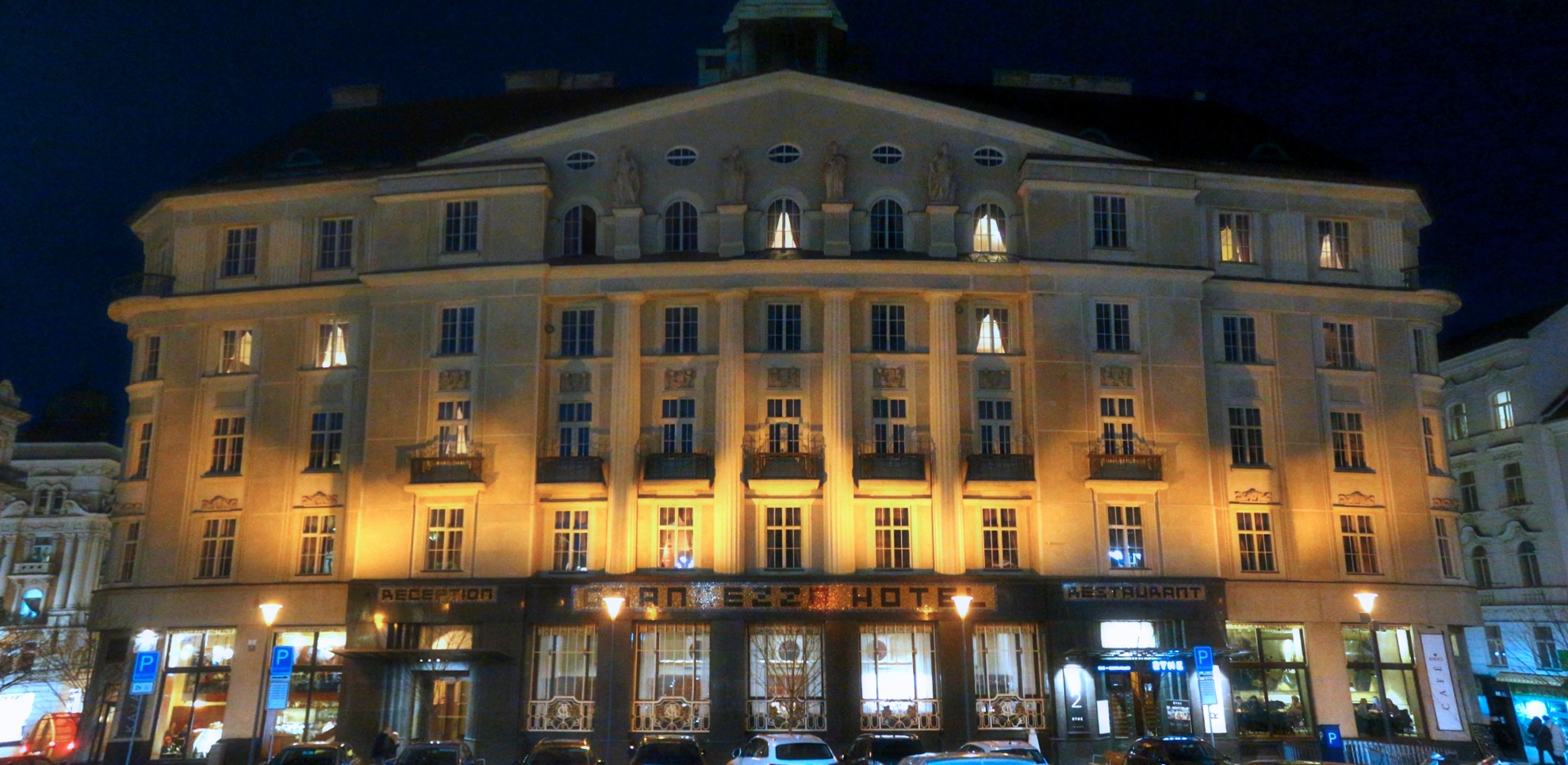 Hotel Grandezza (Brno), někdejší Cyrilometodějská záložna